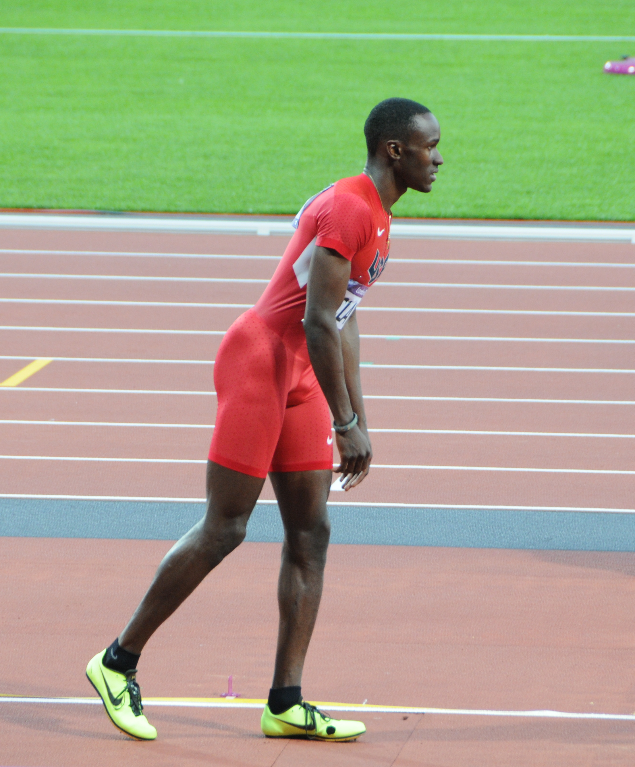 Le sauteur en longueur américain Will Claye médaille de bronze aux JO 2012